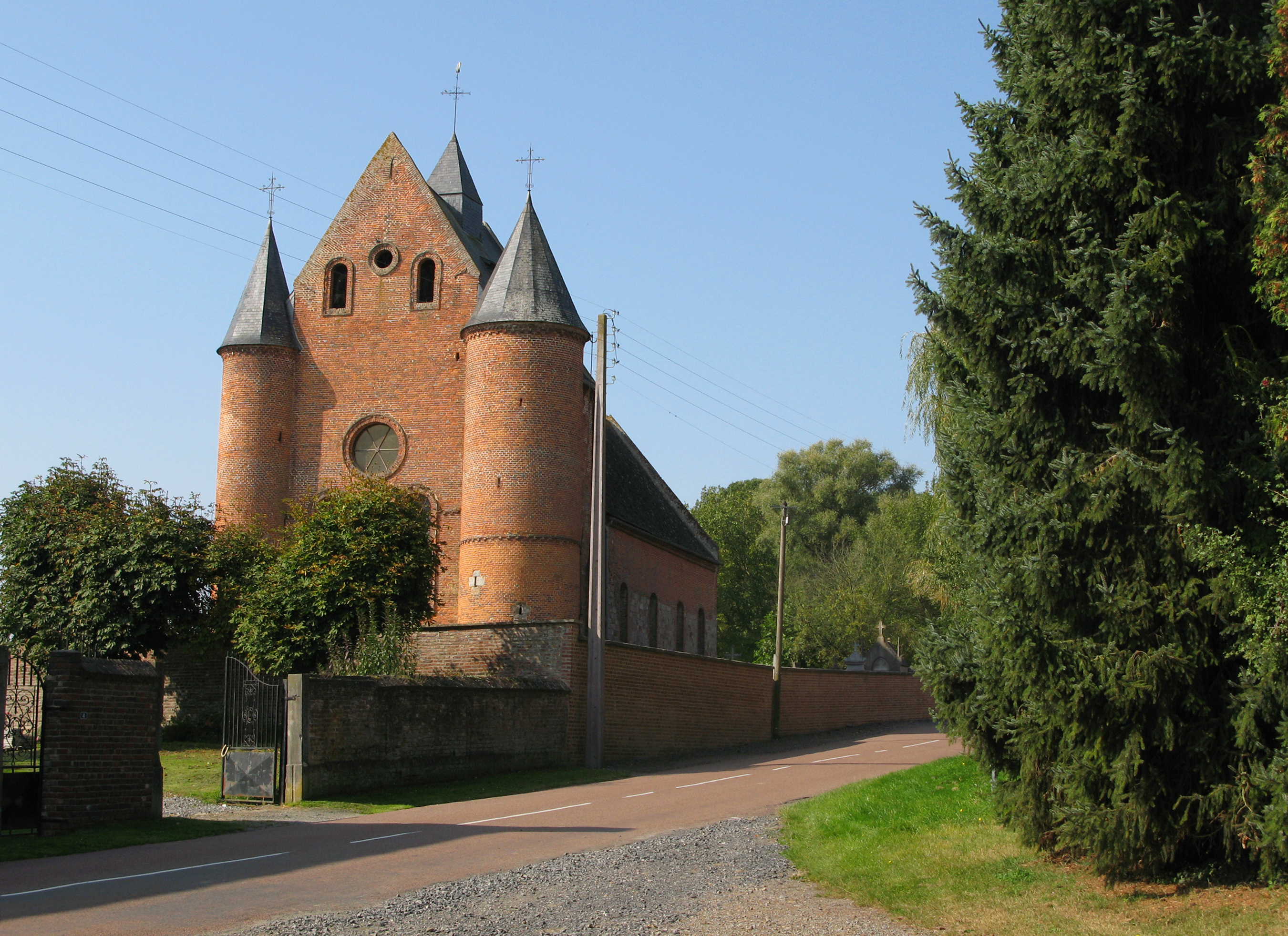 Malzy (Aisne, France) - L'église fortifiée.